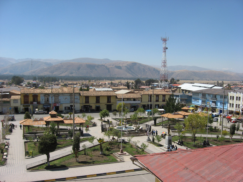 Plaza de Armas de la provincia de Jauja, región Junín, Perú